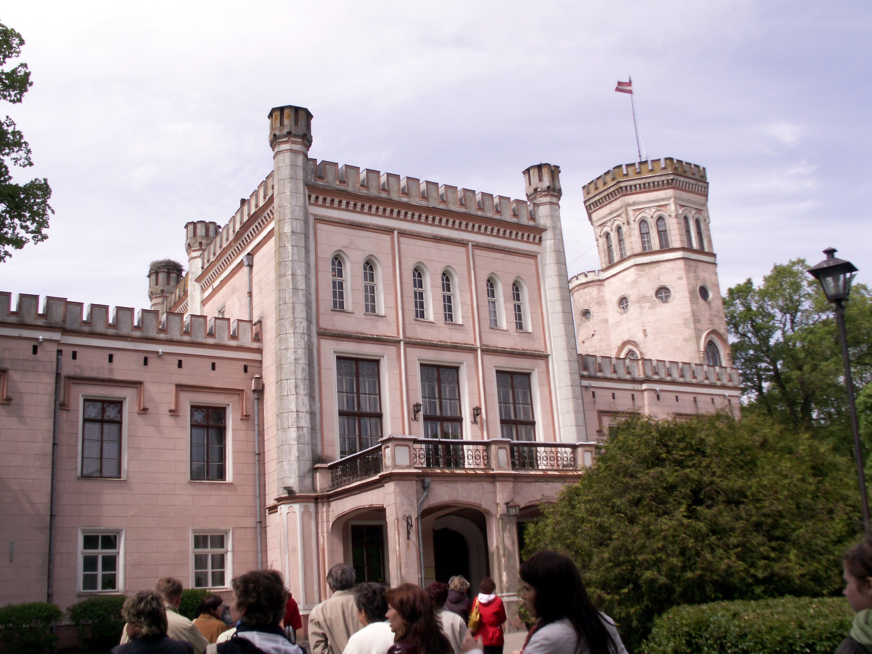 Vecauce caslte